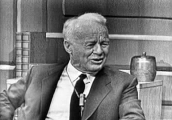 Entrevista a Jam Handy. 26/12/1966 de Profile bajado del Internet Archive de la coleccion Prelinger Archives. La licencia de imagenes de Prelinger es inexistente asi que cuando se cree una esta sera la licencia correcta. Las imagenes de Prelinger Archives no tienen derechos de autor ya que las licencias de dichas companias han expirado y/o no fueron registradas por dichos autores. GuiaMartinez agregara "Jam_Handy_Entrevista_(GuiaMartinez).png" al dominio publico para su informe en Wikipedia.